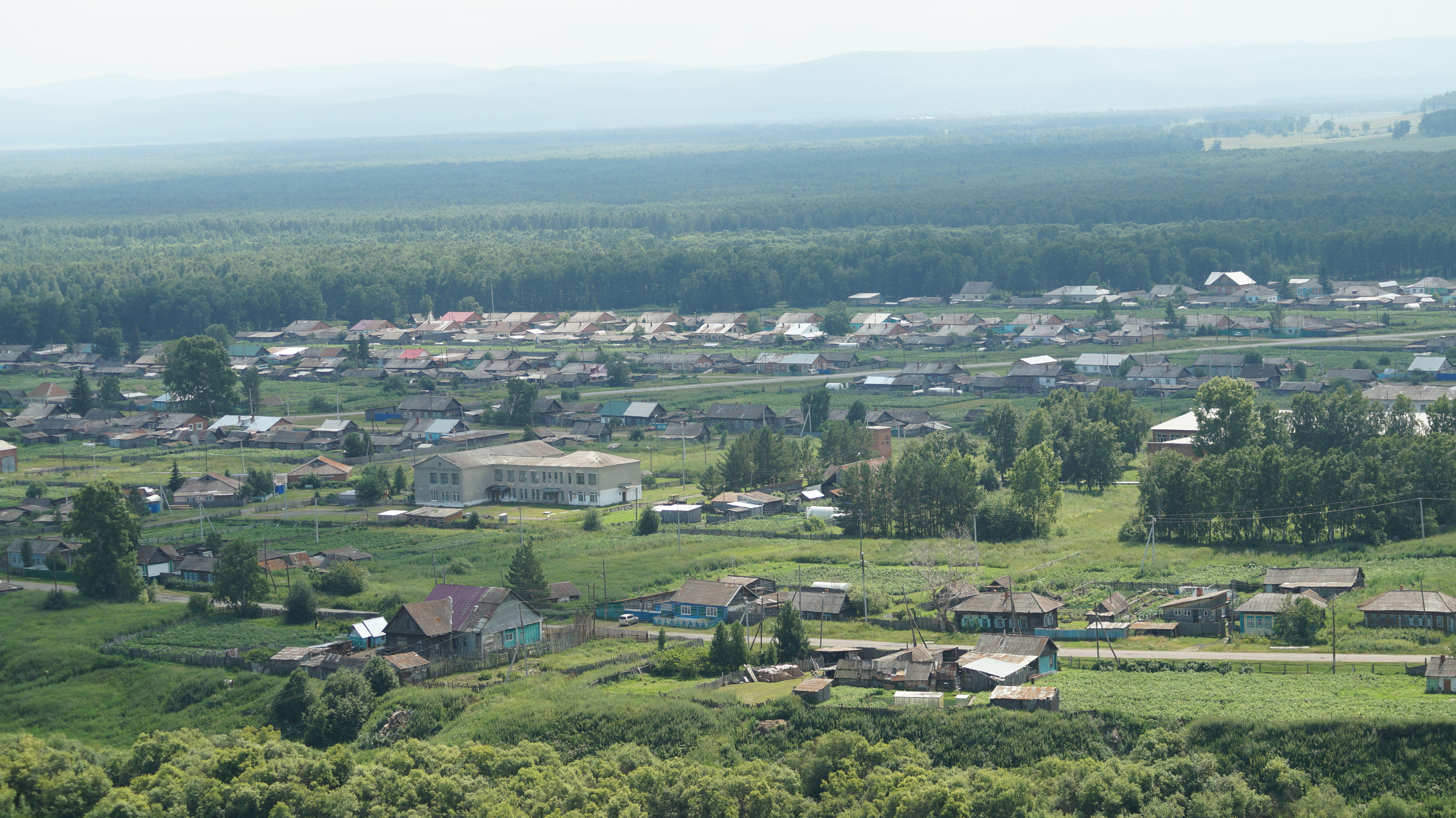 С.Тамбар. Вид с горы на юго-восток